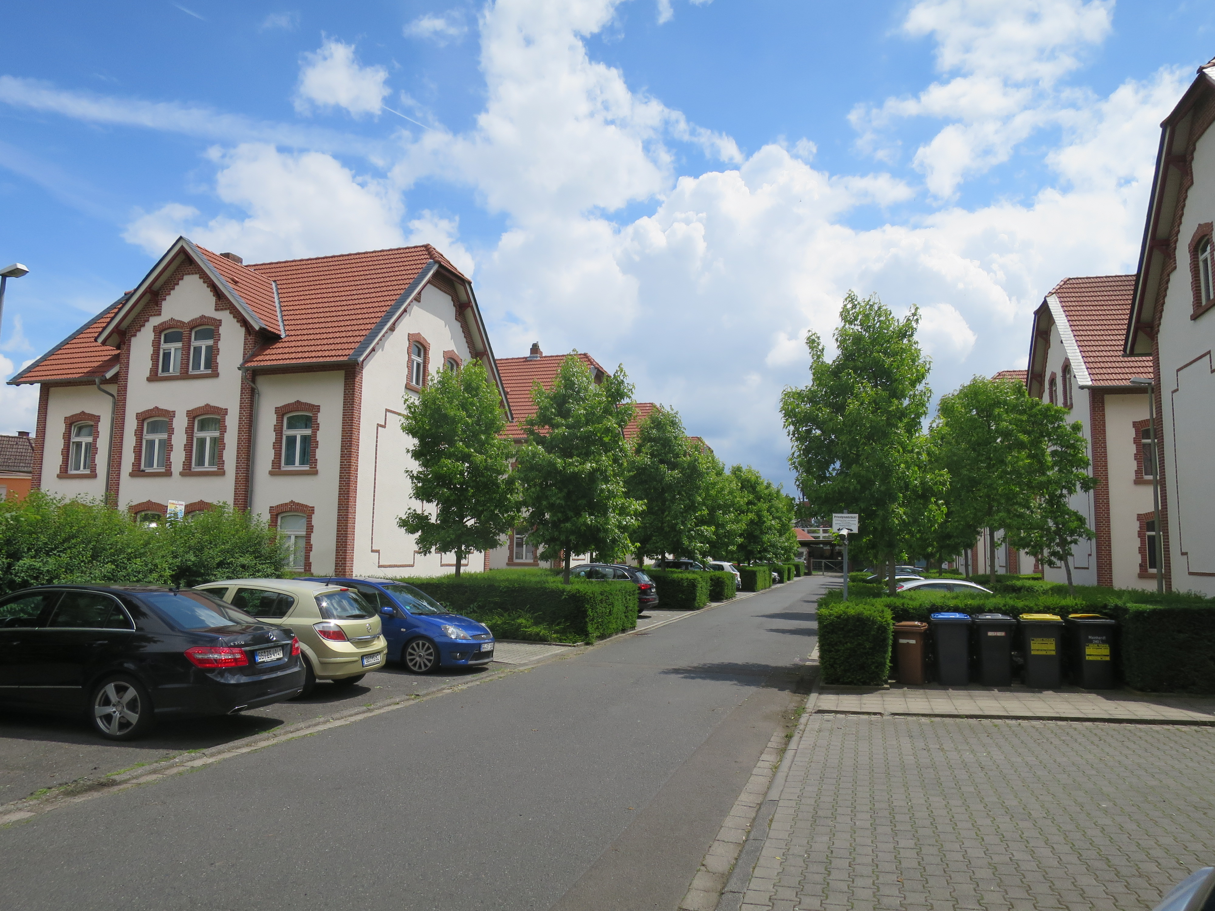 Ehemalige Arbeitersiedlung der Wagonfabrik Kelsterbach